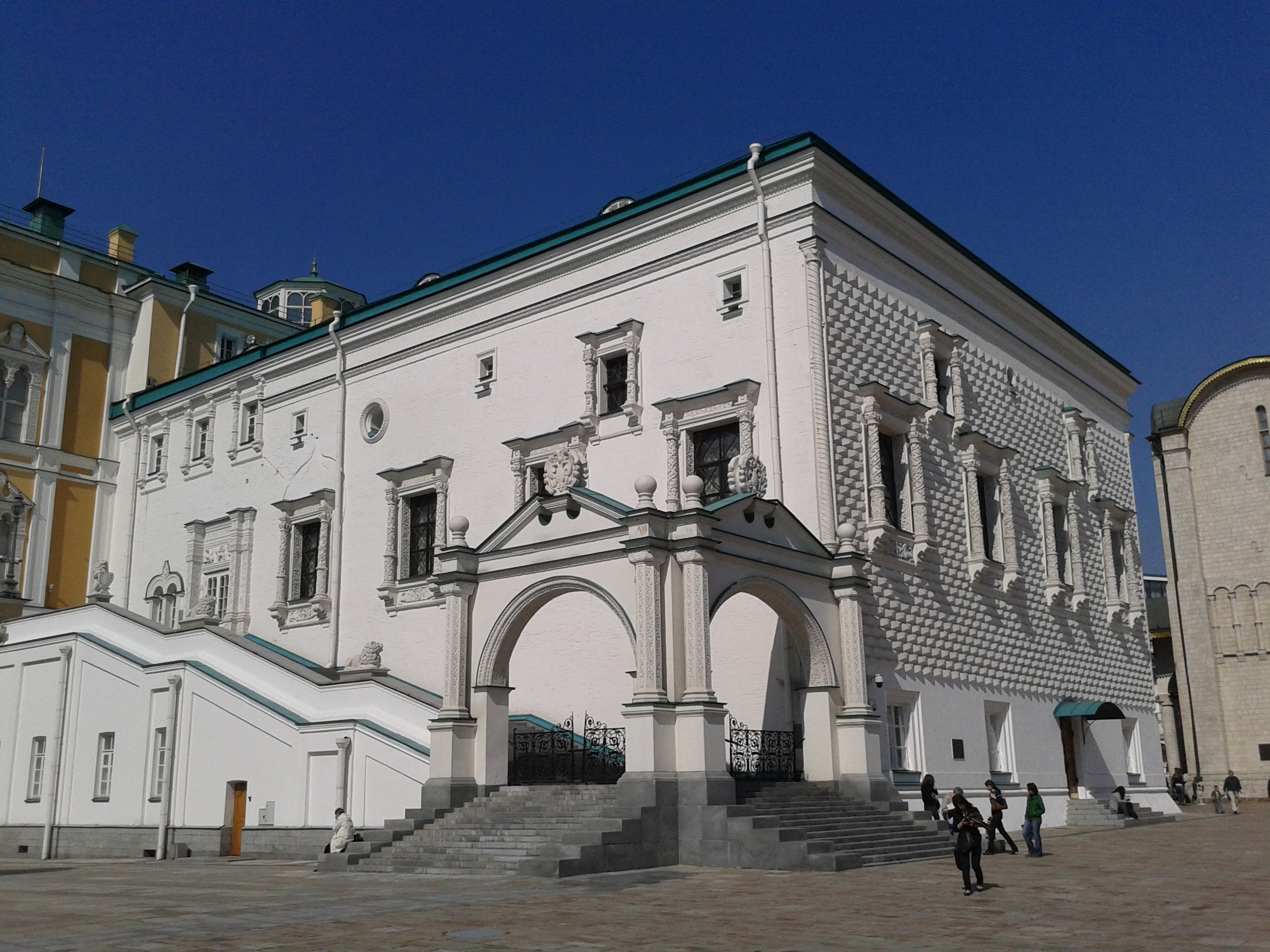 Московский Кремль. Грановитая палата